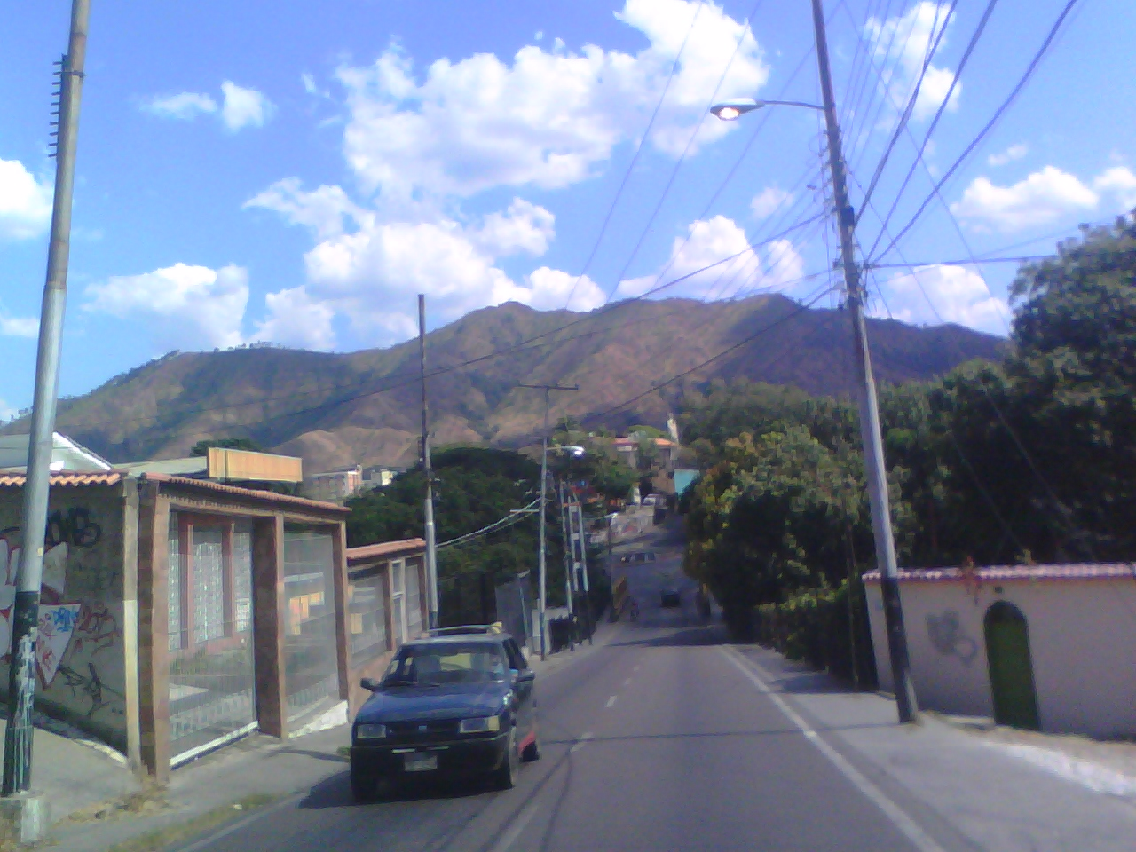 Cerro Santa Rosa desde la Av. Los puentes